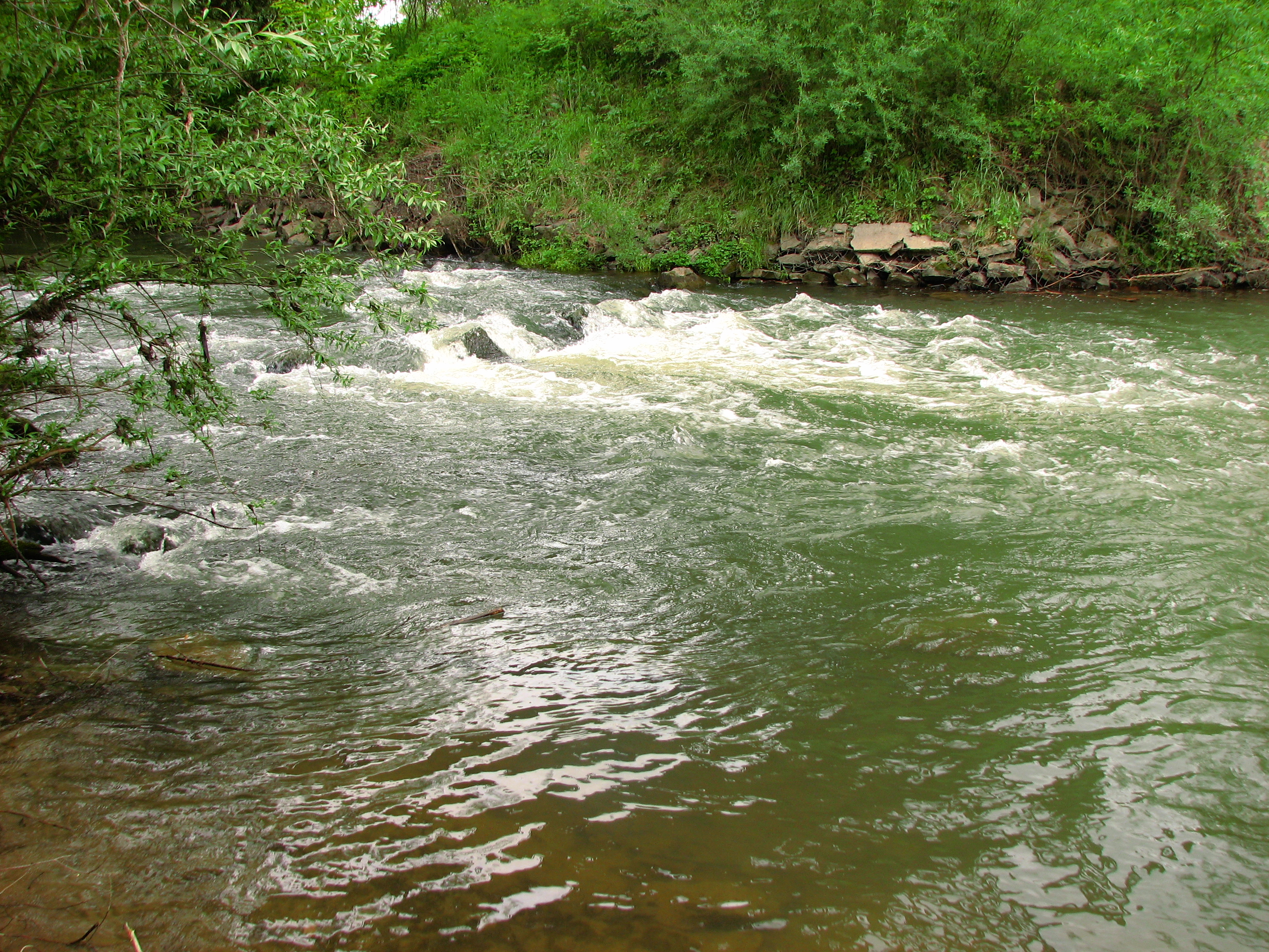 р. Бистриця.